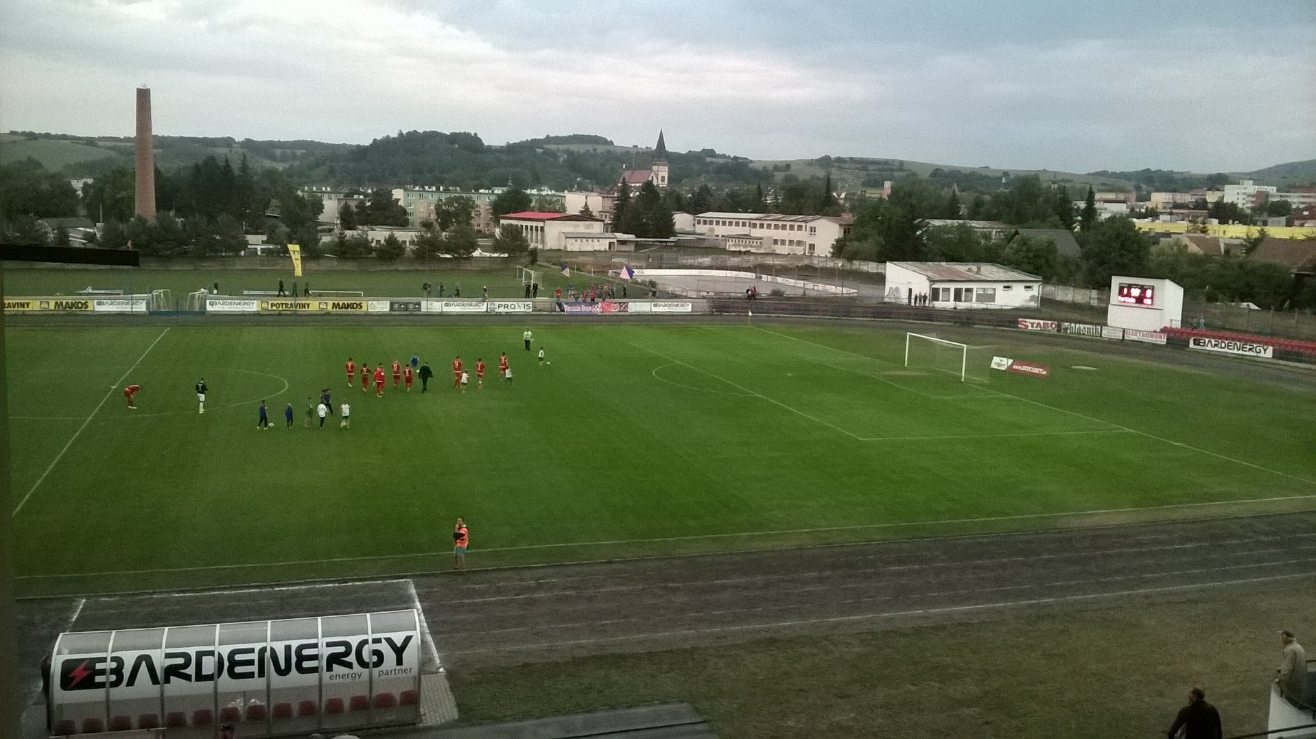 Mestský štadión v Bardejove, posledný zápas pred rekonštrukciou.